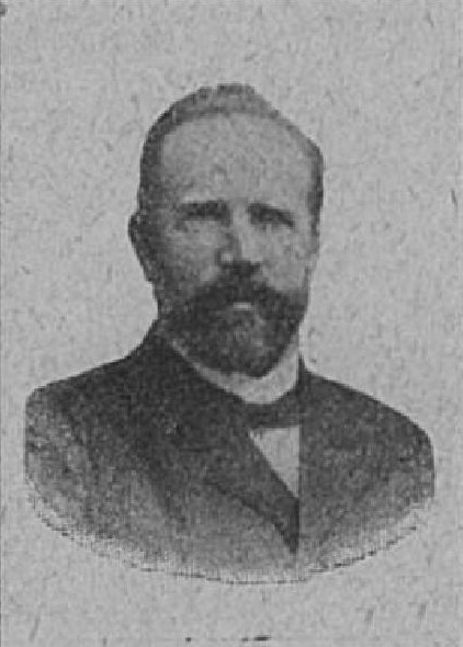 Jan Kožmín (1845-1924), rakouský a český rolník a politik